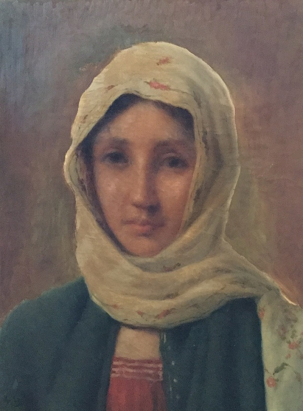 Ritratto di fanciulla, olio su tela, 48 x 35 cm., coll. privata